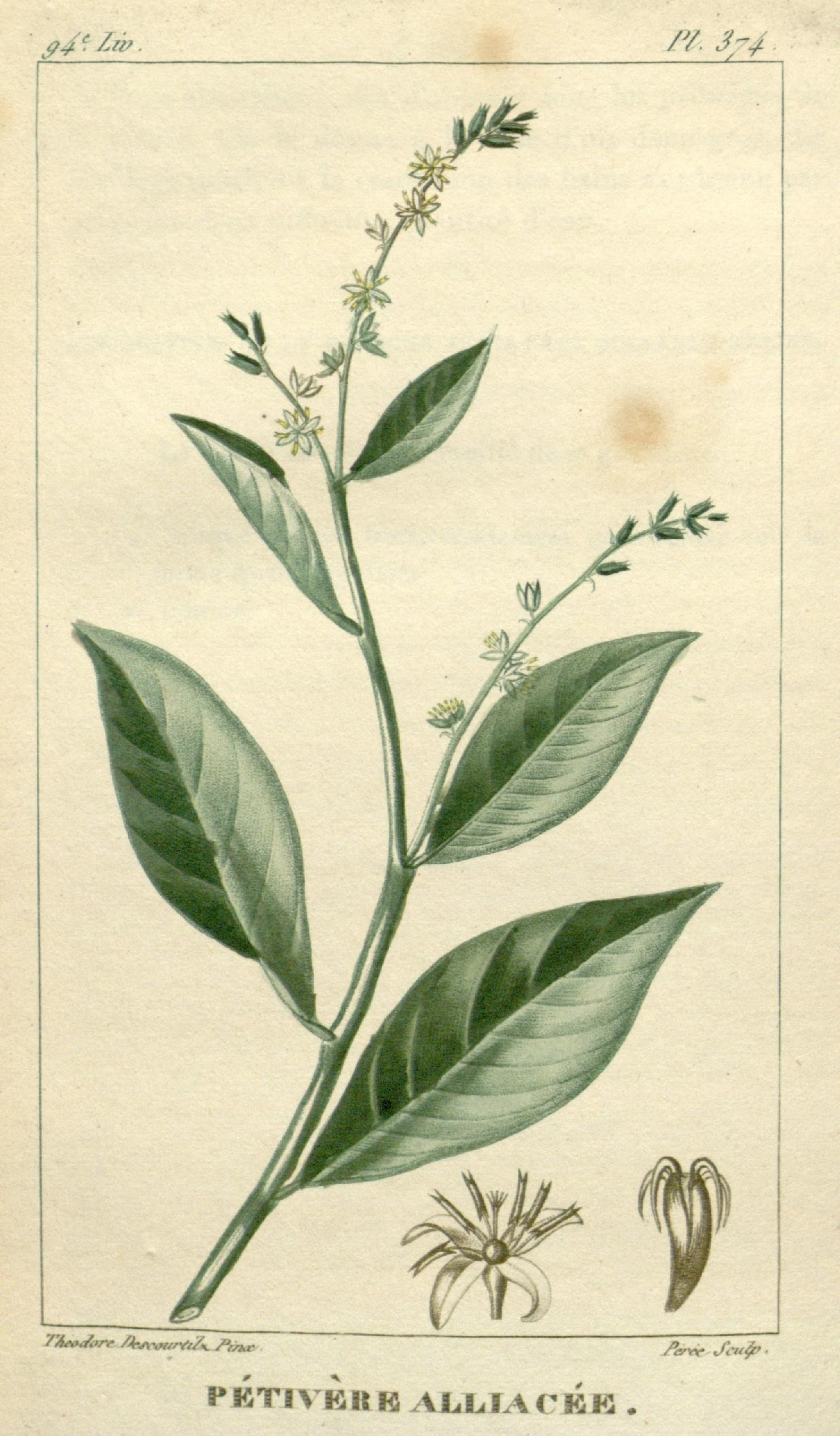 PBT1VBRH ALLIACÉE .